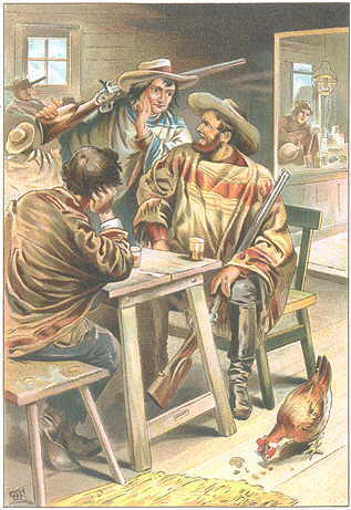 Illustration von Maximilian Schäfer aus dem Buch Der Schatz des Kaziken. Abenteuer und Kämpfe eines jungen Deutschen mit den Desperados im fernen Westen. Der reiferen Jugend erzählt von E. von Barfus. Stuttgart, K. Thienemanns Verlag, Anton Hoffmann. (1890).